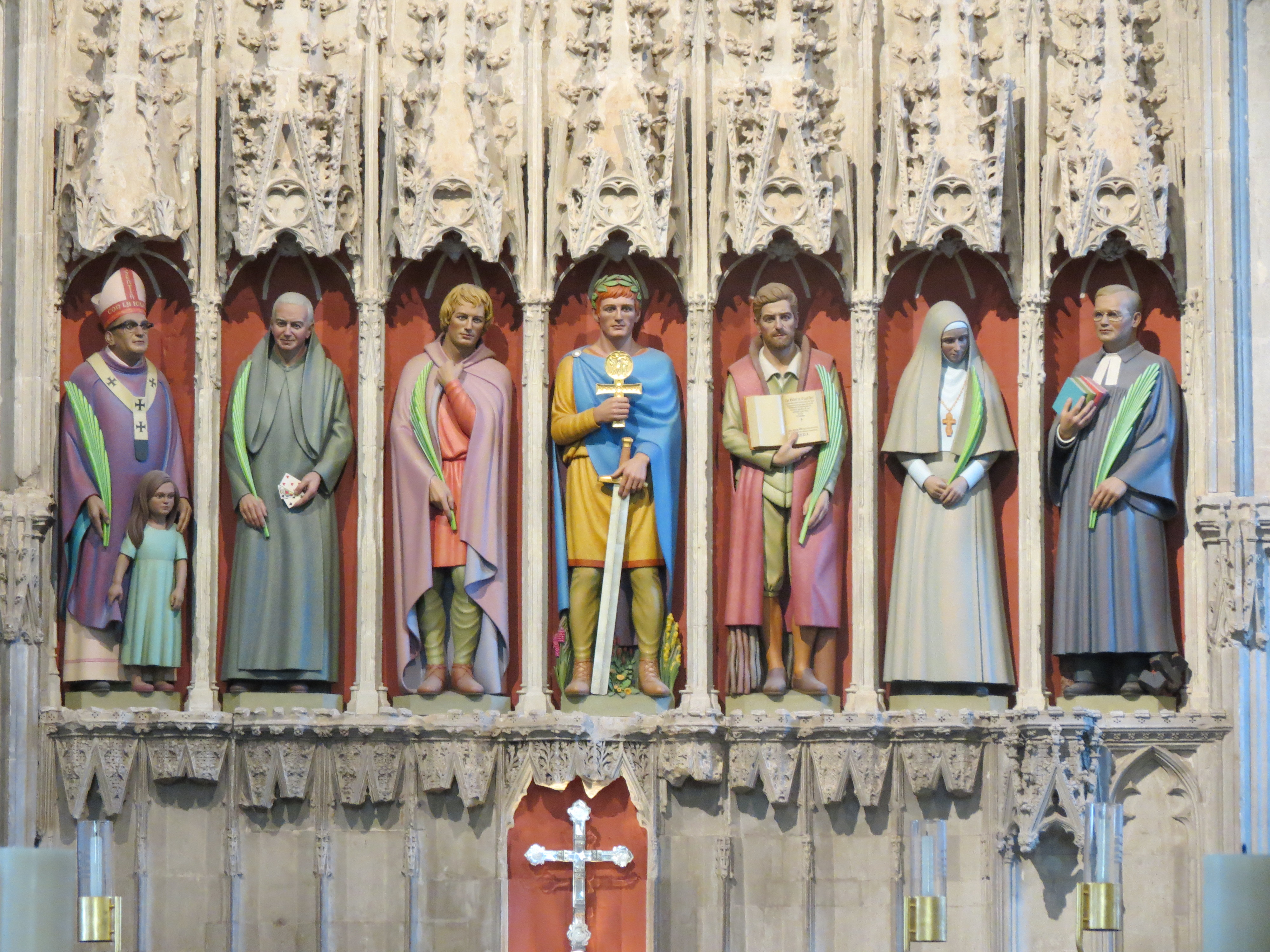 Statues polychromes sur le jubé de la cathédrale de Saint-Alban (de gauche à droite) d'Oscar Romero, Alban Roe, Amphibalus, Alban, George Tankerfiels, Elisabeth Romanova et Dietrich Bonhoeffer.